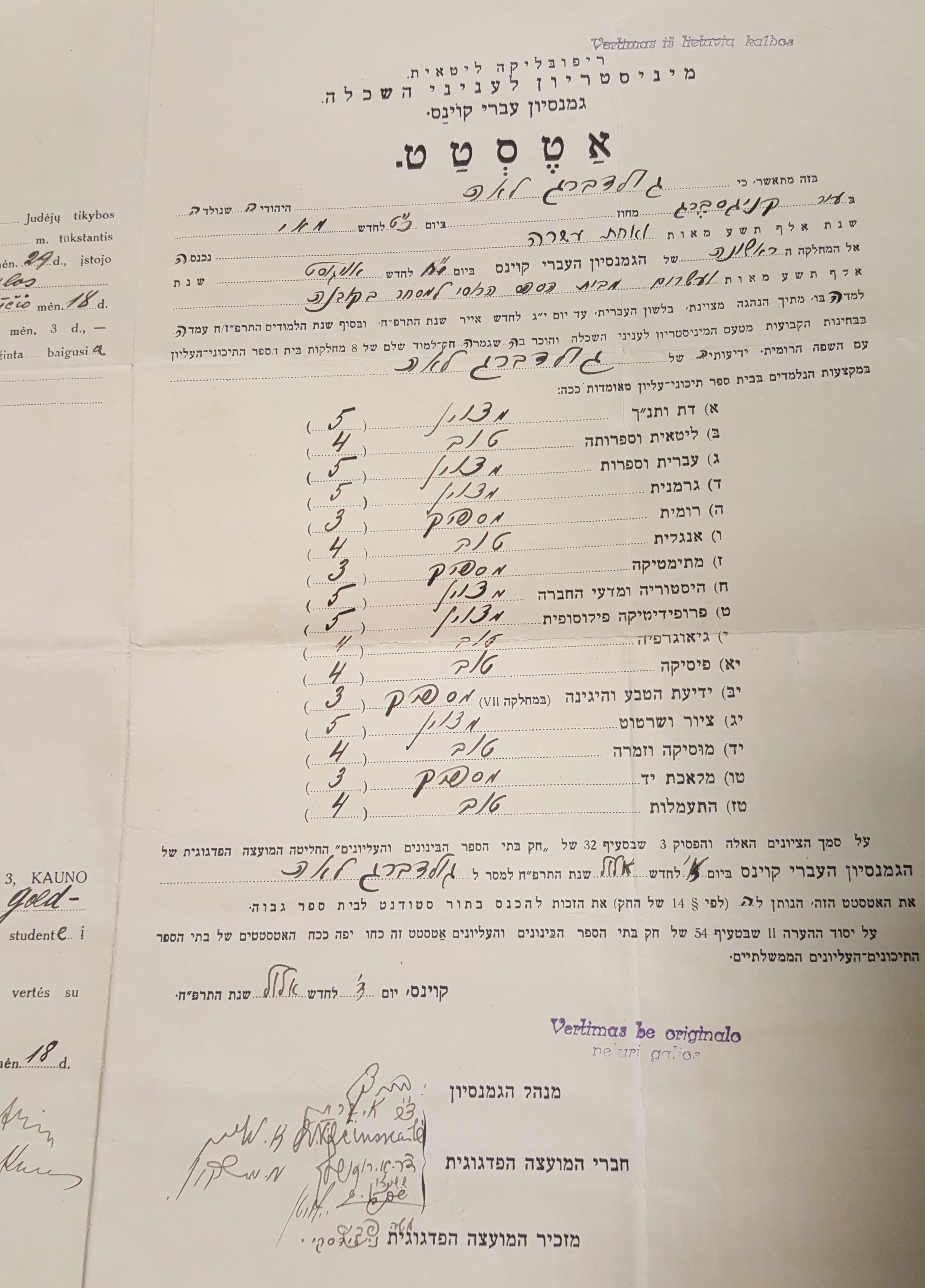 תעודת בגרות של לאה גולדברג בגמנסיה העברית קוֹינַס בליטא, 20 באוגוסט 1928, ארכיון "גנזים", תל אביב. צולמה על ידי Ovedc.